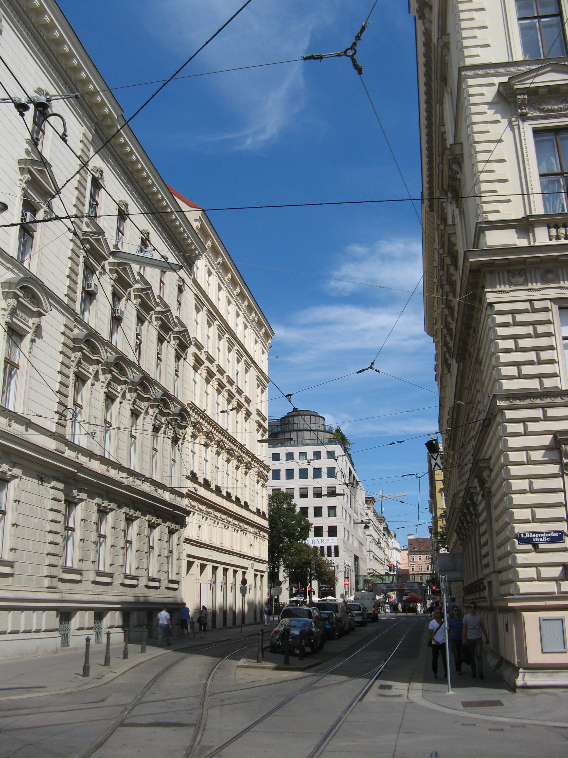 Blick stadteinwärts von der Bösendorferstraße in die Akademiestraße, Wien-Innere Stadt